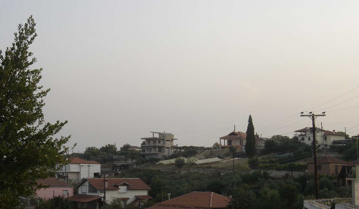 View of Koukos, Pieria.